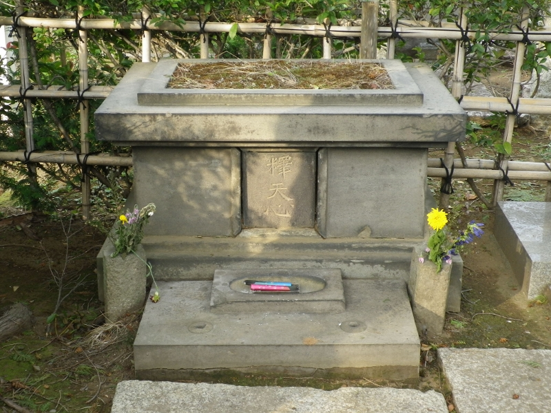 岡倉天心の墓